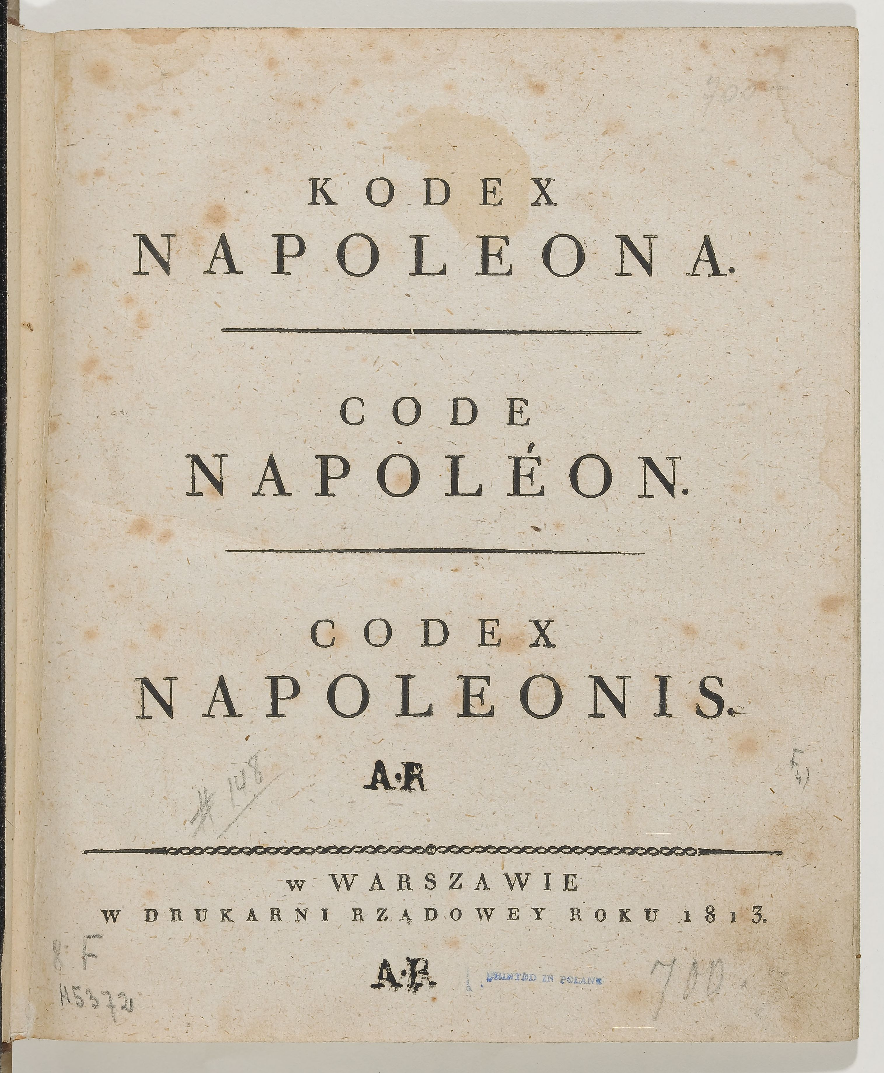 Kodex Napoleona